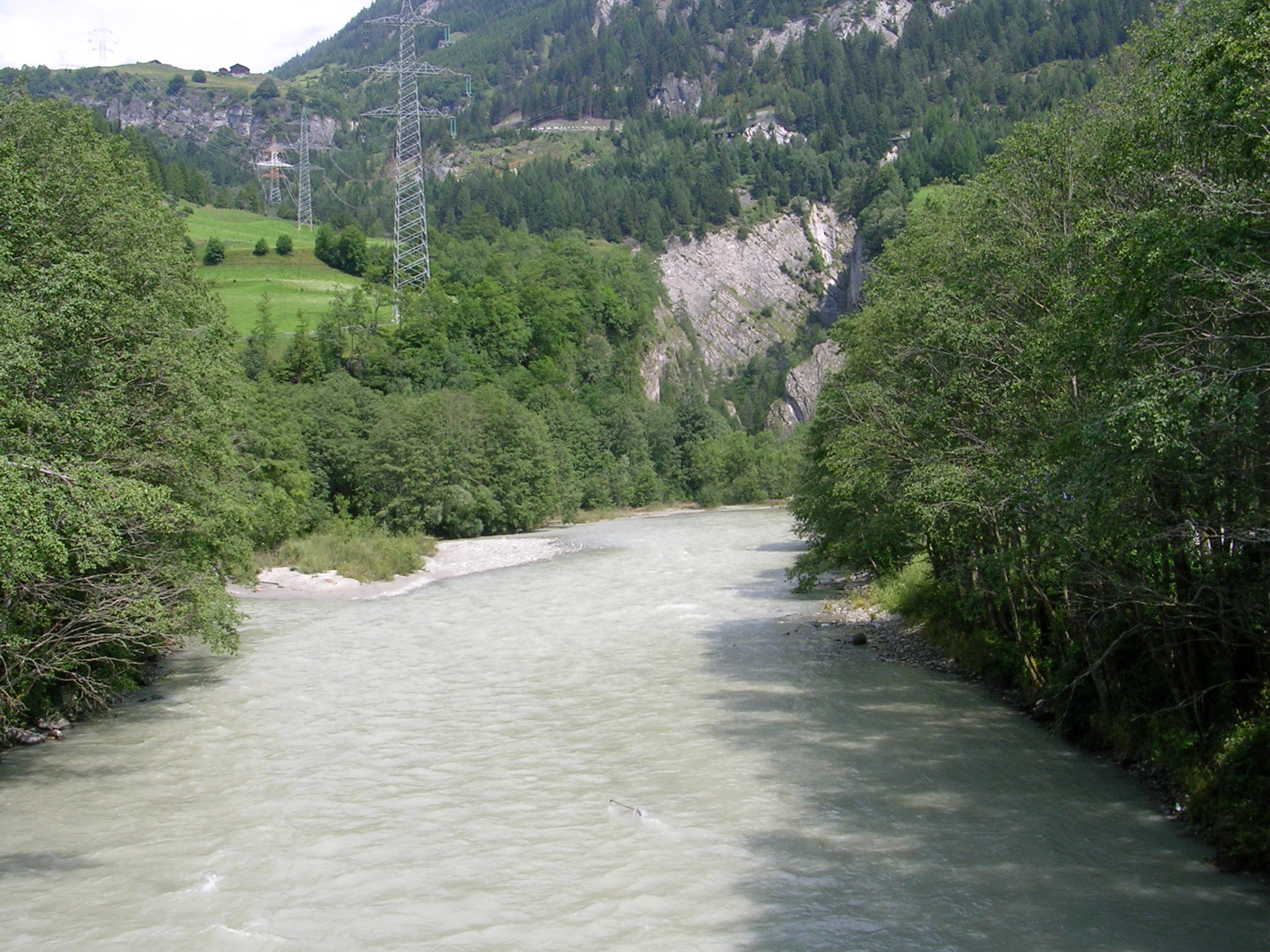 Tauernbach near Prosegg, below Prosseggklamm